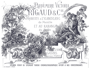 Prospectus de la Parfumerie Victoria Rigaud & Cie, 8 rue Vivienne Paris, Ylangylang de Manille et Kananga du Japon - destiné aux correspondants de la firme (original en chromolithographie).